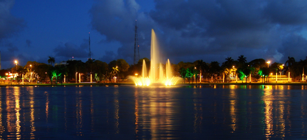 Parque Sólon de Lucena iluminado para o natal. (João Pessoa, Brasil).